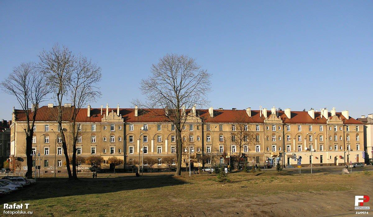 Jeden z najstarszych budynków wielorodzinnych w Radomiu, wybudowany w okresie międzywojennym dla pracowników Fabryki Broni.